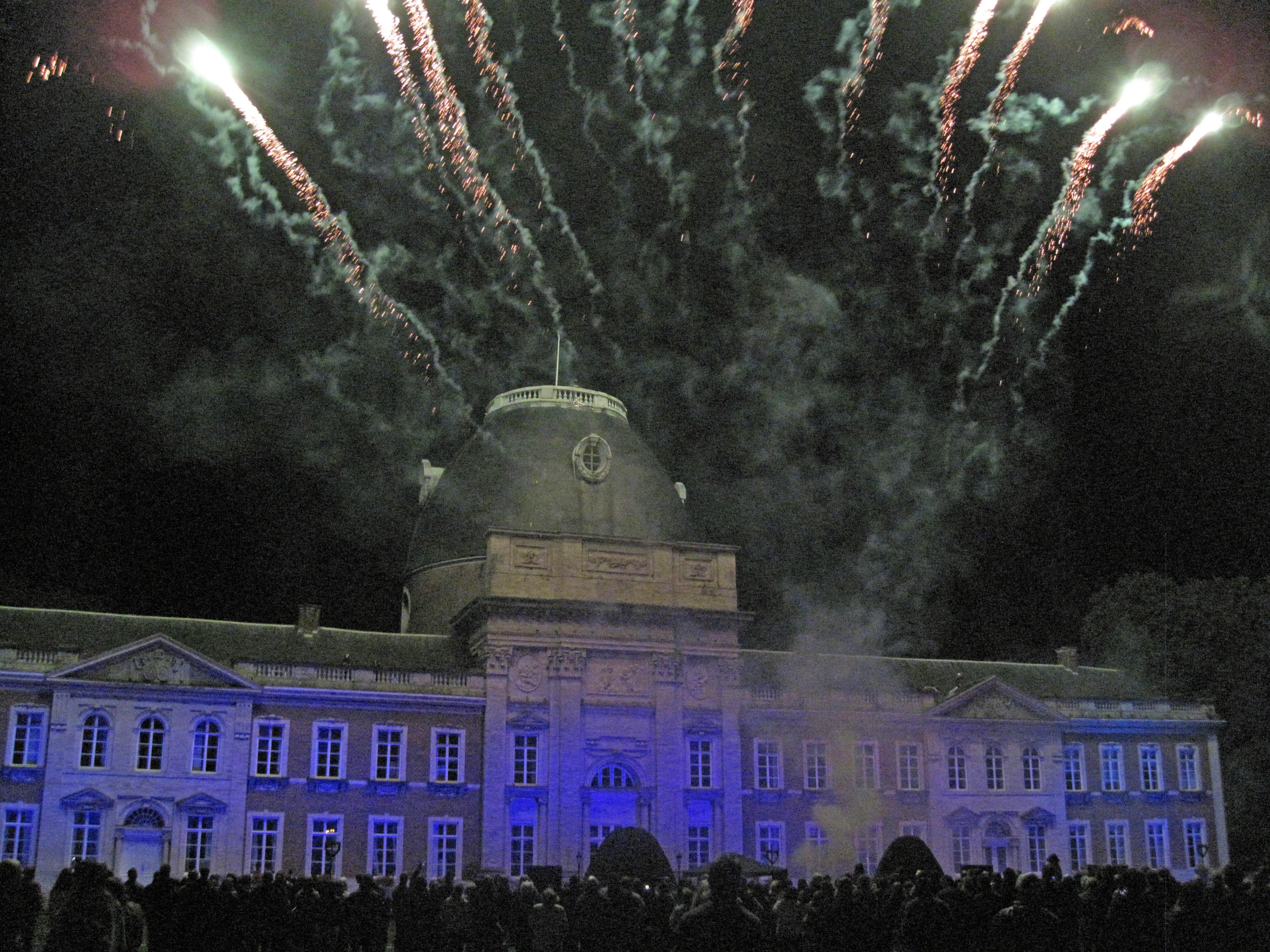 Façade de l'abbaye d'Hélécine (Brabant Wallon)